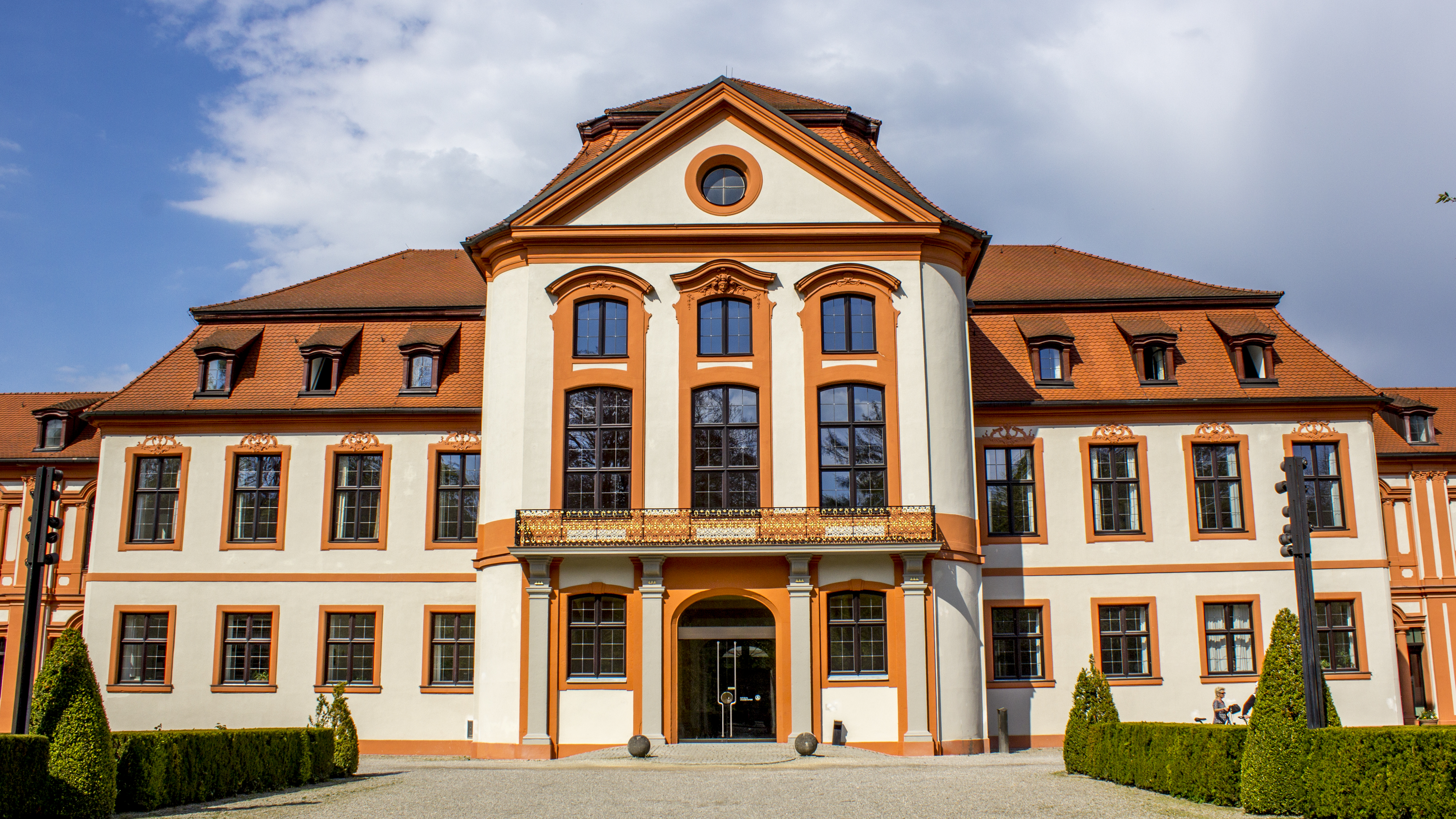 Edificio principal de la Universidad Católica de Eichstätt-Ingolstadt